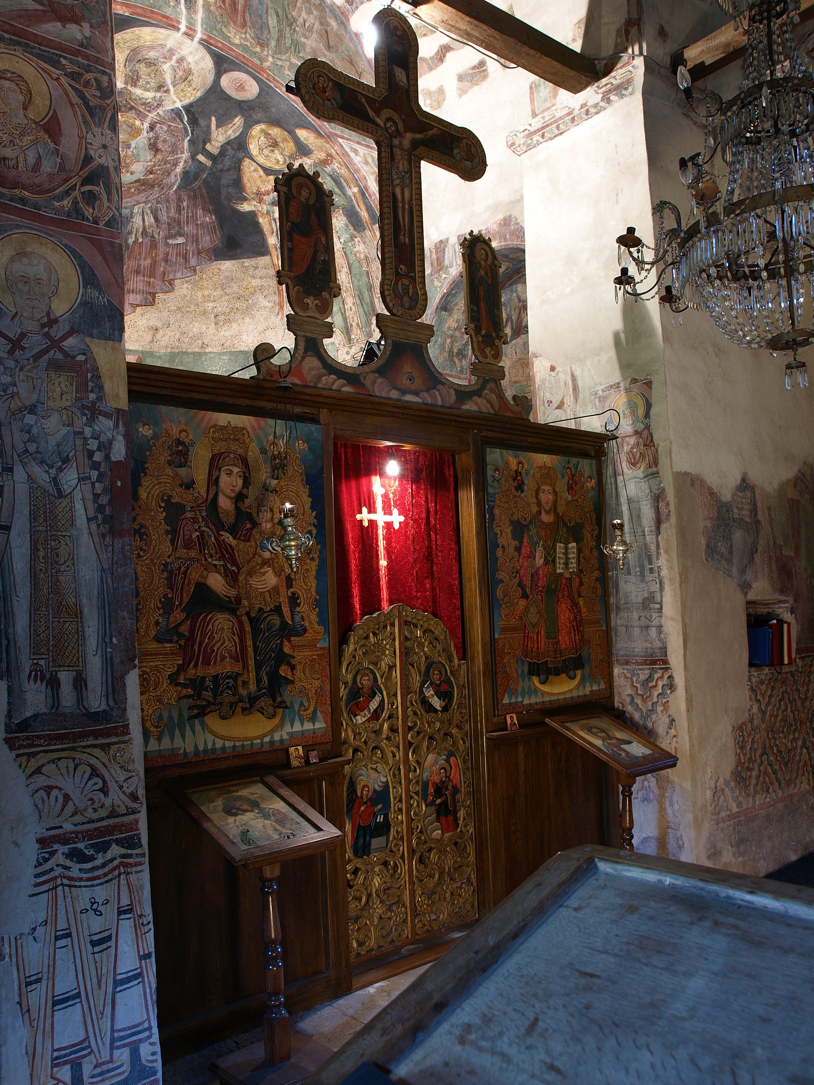 Ја, творац ове слике, предајем је у јавно власништво. Ово се односи на цео свет.